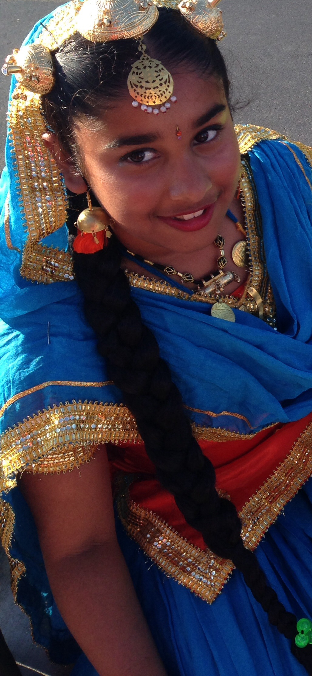 Ready to perform punjabi cultural dance" Gidha"